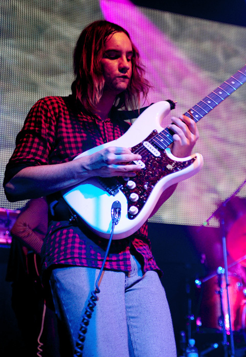 Tame Impala @ Metropolis Fremantle (27/5/2010)